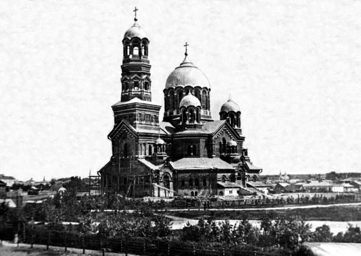 Самара. Кафедральный собор. Фотография. ~1900-е годы.